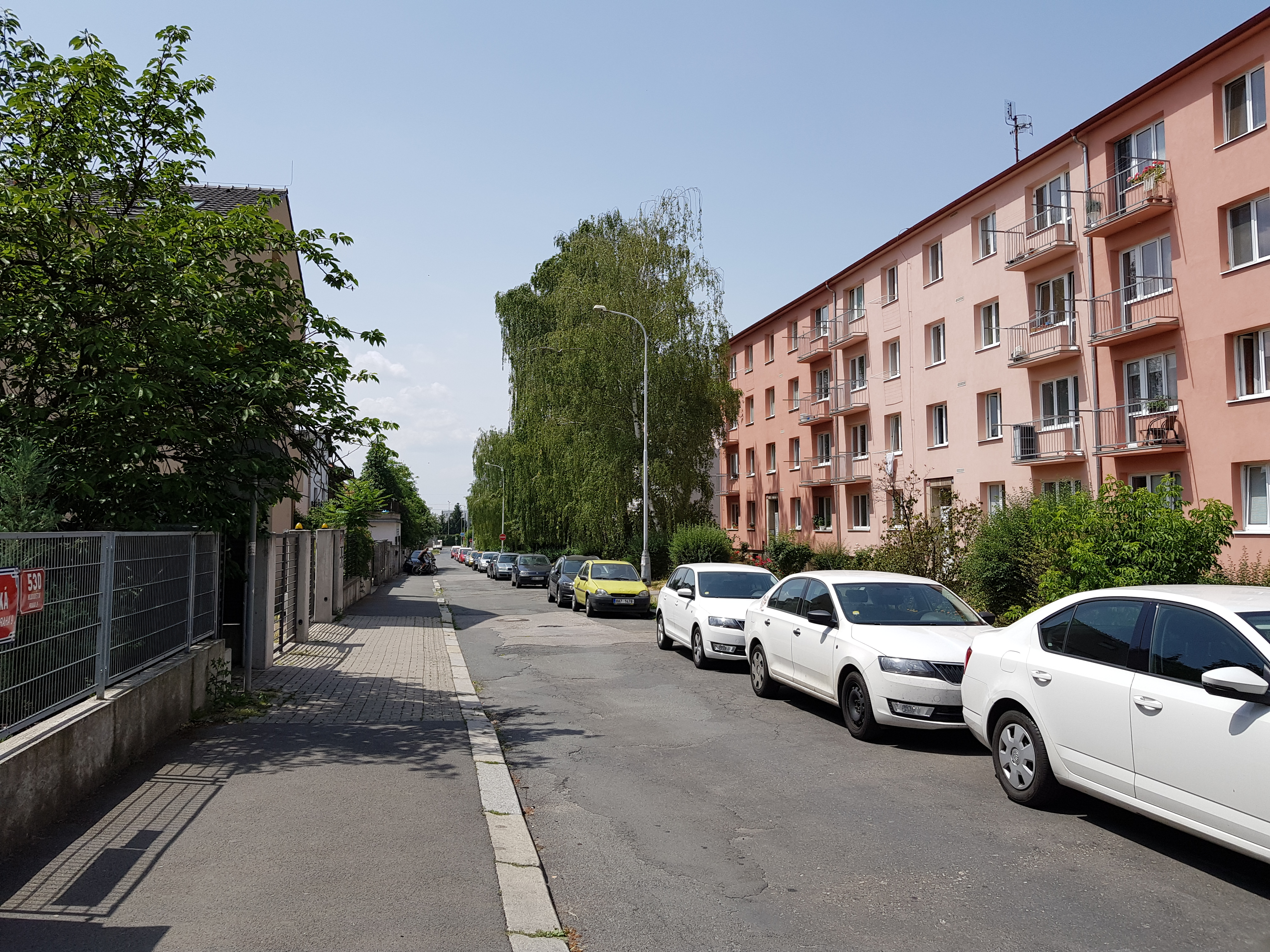 Ulice Sadská, Praha-Hloubětín, ulice Sadská, pohled západním směrem od mateřské školy čp. 530